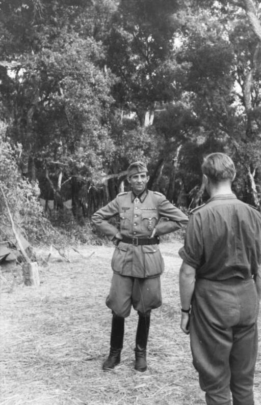 Information added by Wikimedia users.Il generale tedesco Frido von Senger parla ad un soldato italiano. Estate 1943.